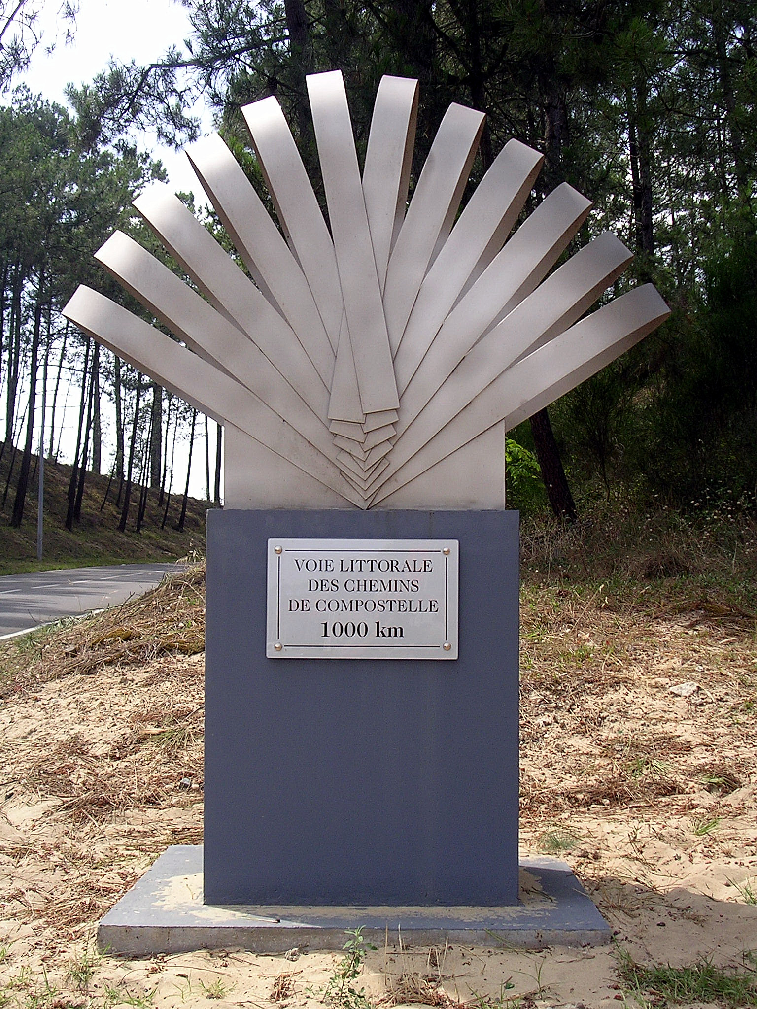 Borne des 1000 km de Saint-Jacques-de-Compostelle. Photo prise à Mimizan, Landes, France, par Jibi44 en juillet 2006